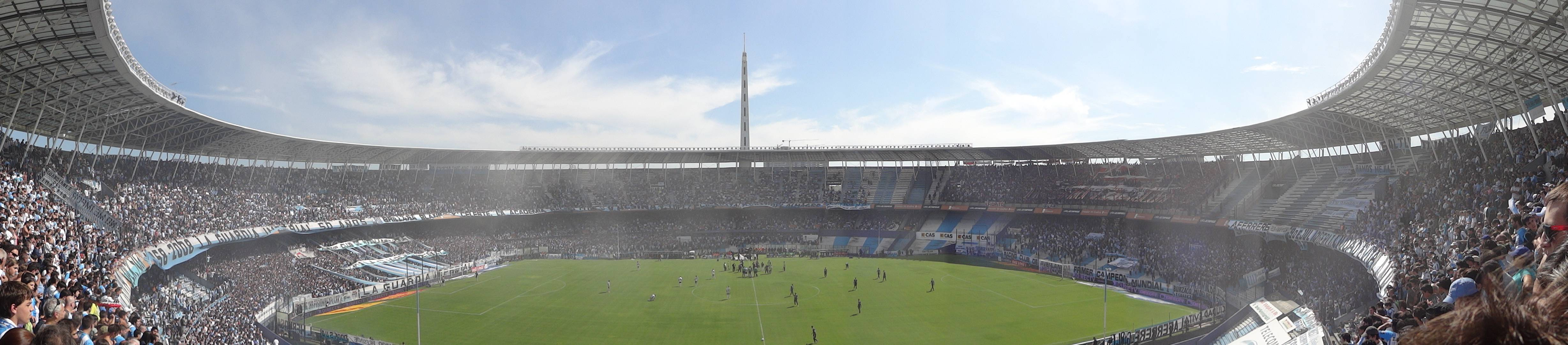 Panoramica Cilindro